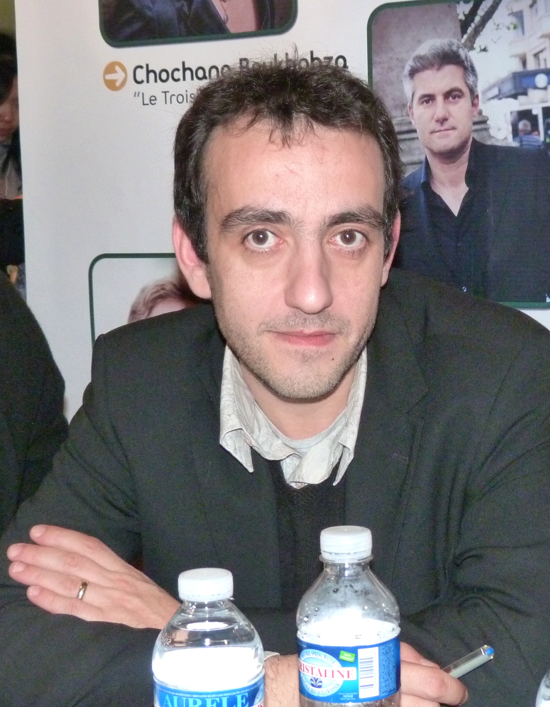 Jérôme Ferrari, lors d'une signature à la FNAC Forum à Paris, pour son livre "Où j'ai laissé mon âme", le 26 novembre 2010.